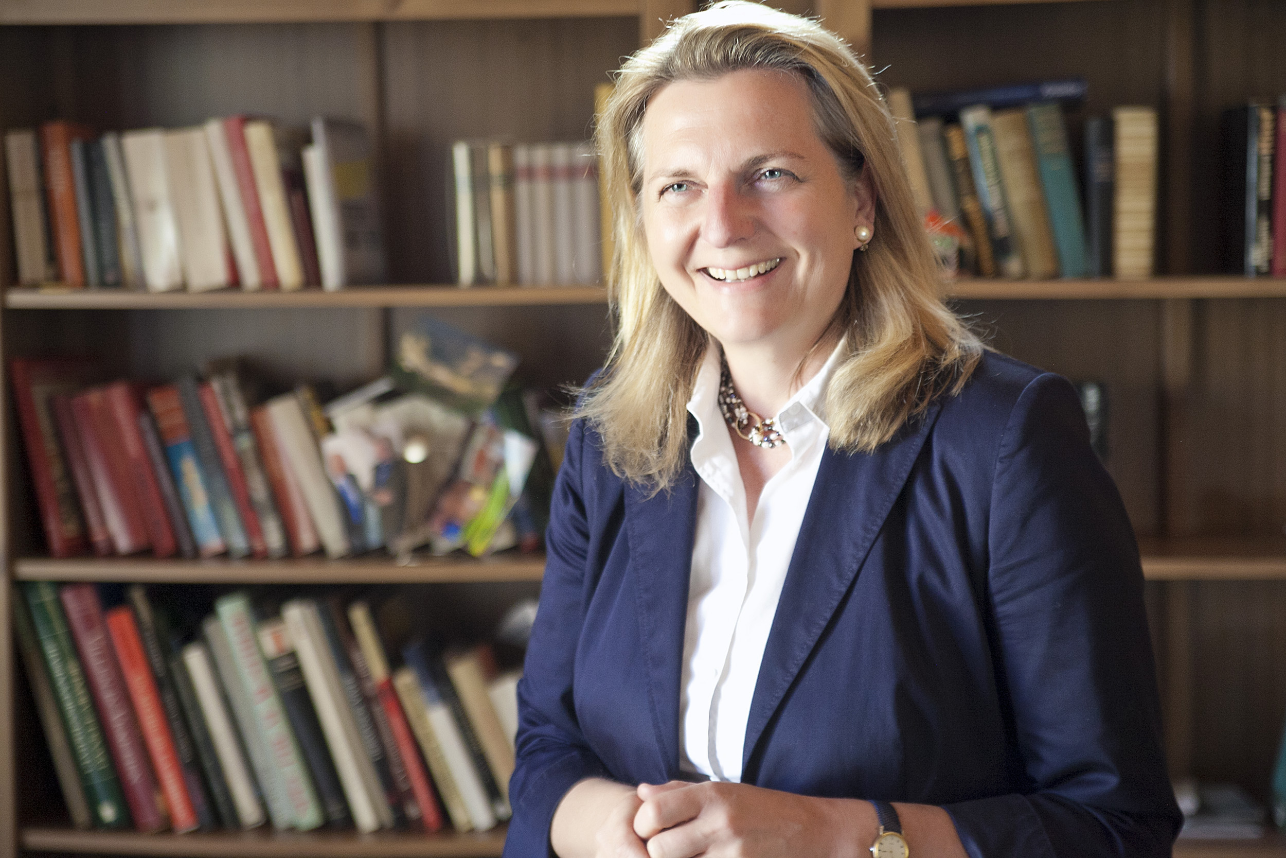 Portrait von Karin Kneissl